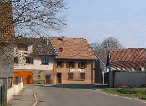 Village d'Eloie dans le Territoire de Belfort (France), Rue principale au coeur du vieux village. Photo prise le 30 mars 2004 par LP90 17 aoû 2004 à 12:09 (CEST) LP90